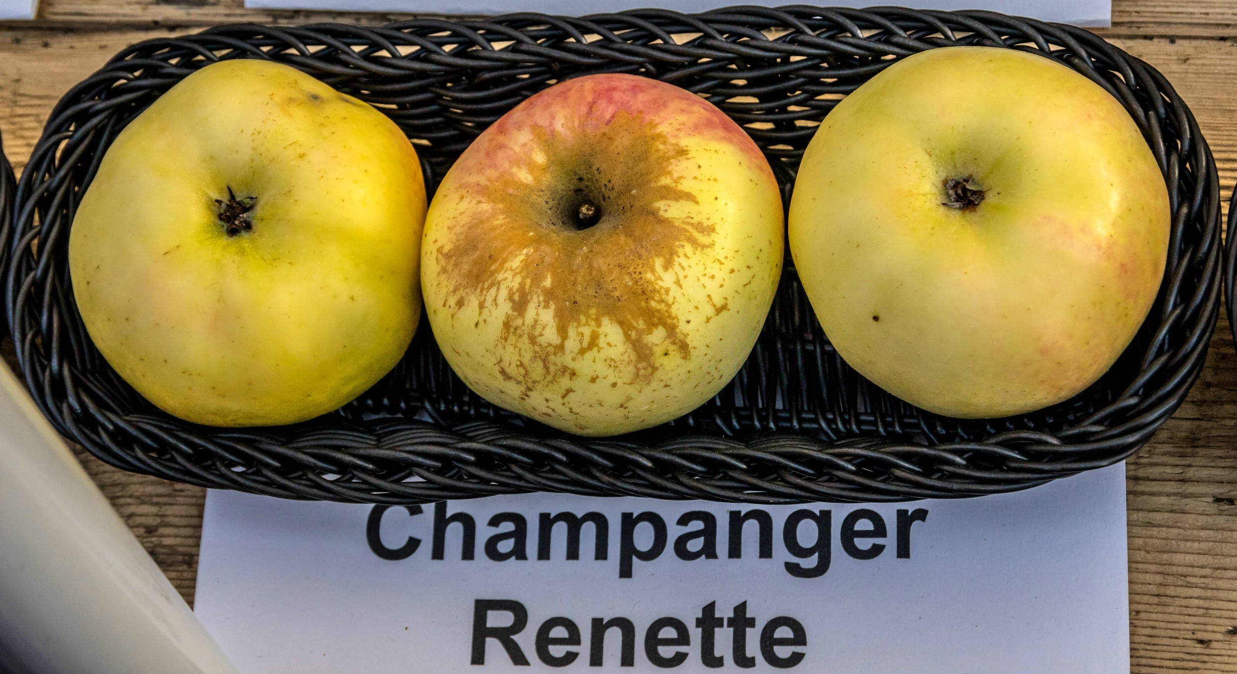 Alte Apfelsorten, von denen es im Badischen noch tragende Bäume gibt. Alle Aufnahmen au dem Oktober 2015